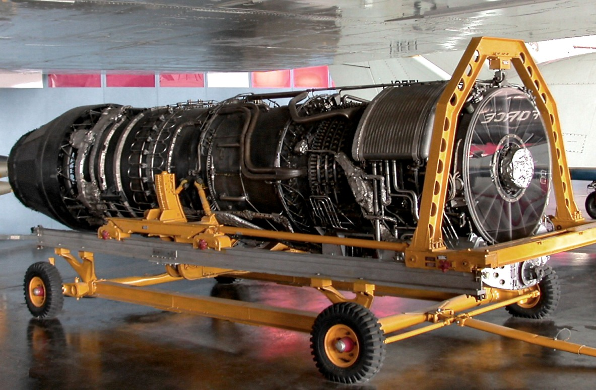 General Electric YJ93 turbojet, USAF Museum, Ohio / 2004